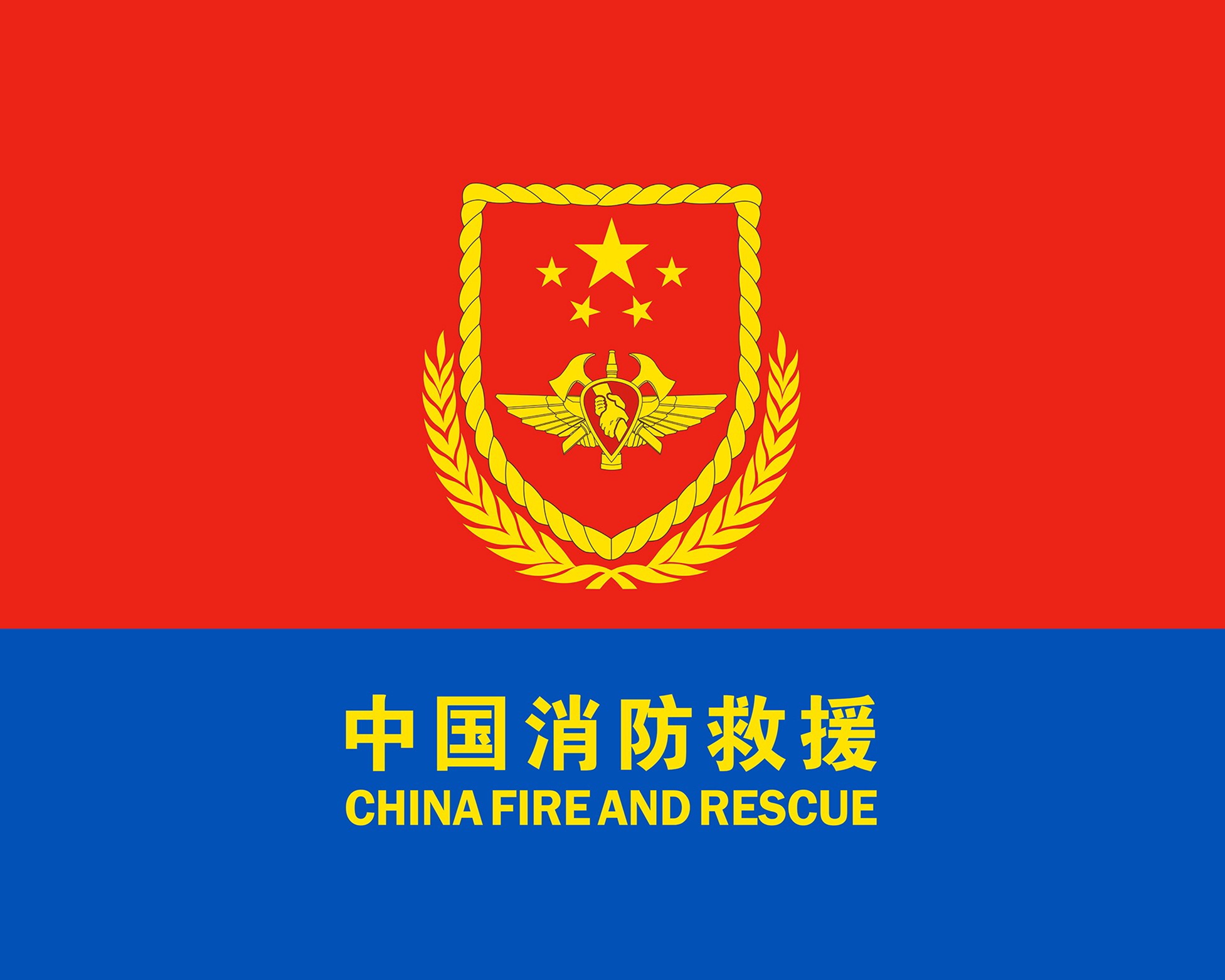 中文（中国大陆）: 中国消防救援队队旗